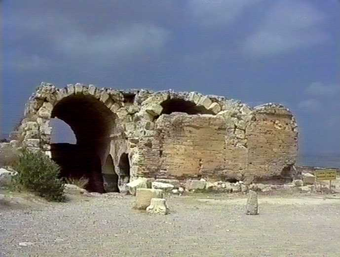 Ayathekla, Pilgerstätte der Hl. Thekla in Silifke, Südtürkei, Zisterne